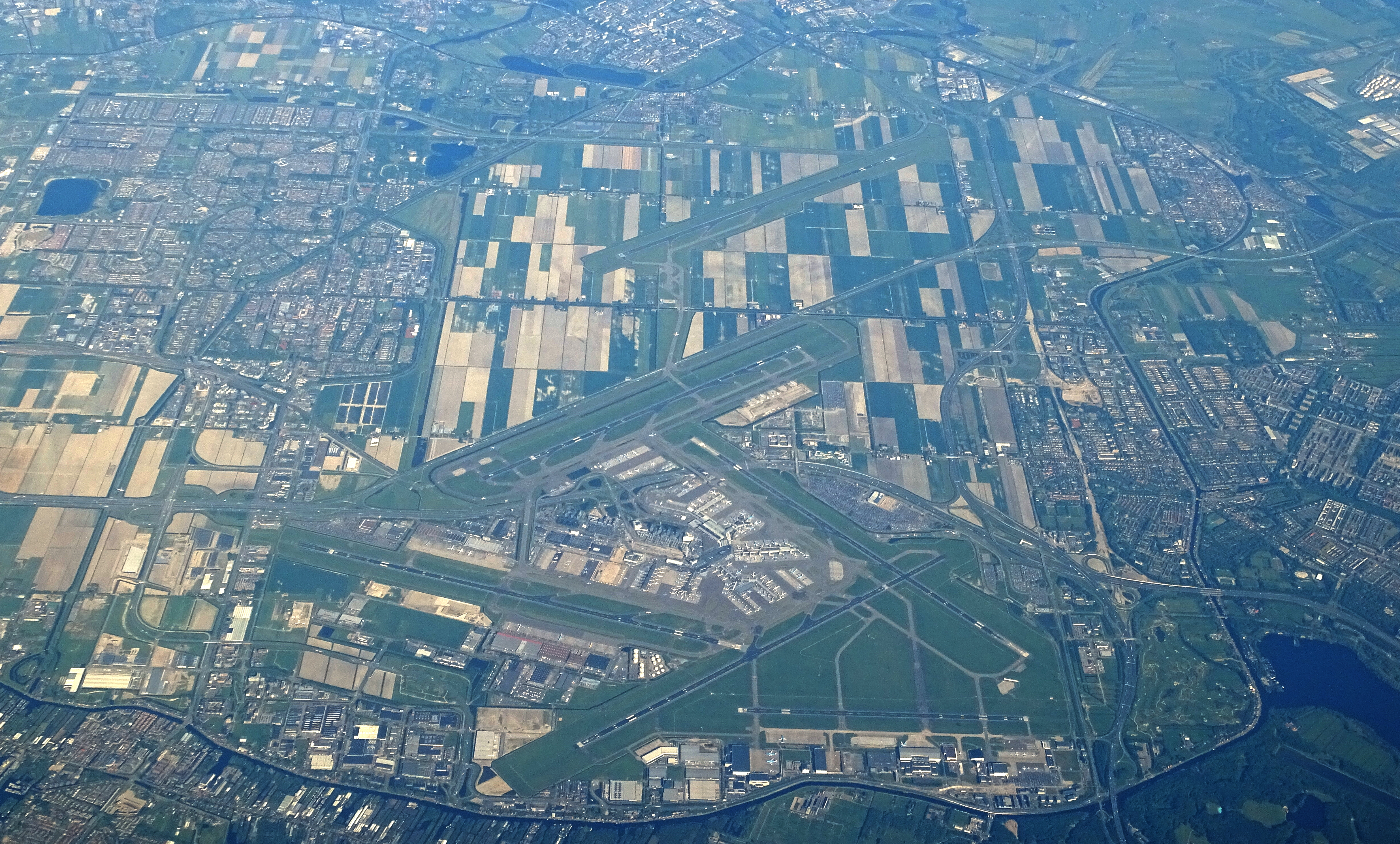 Luchthaven Schiphol, Nederland.